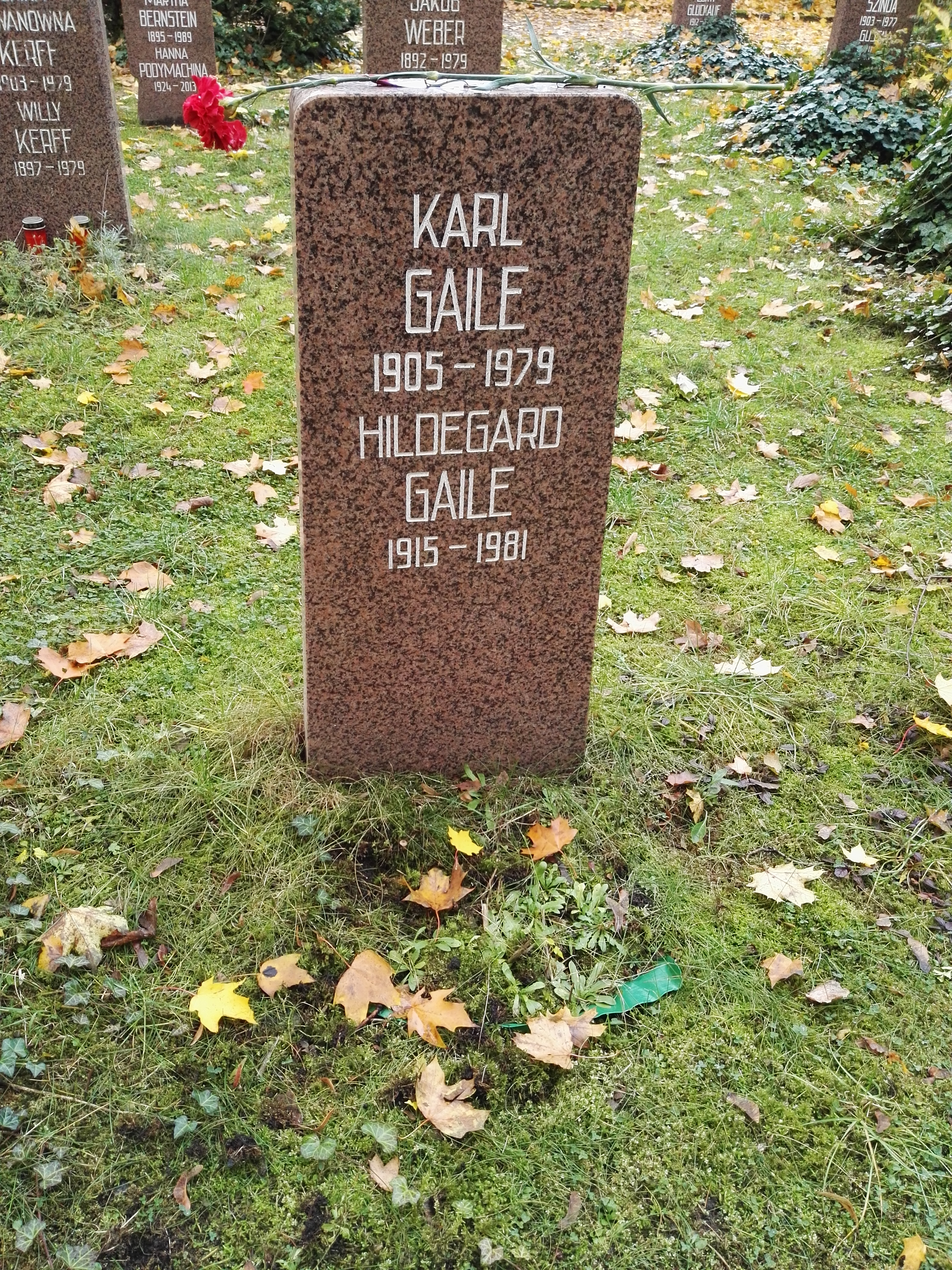 Grab von Karl Gaile und Hildegard Gaile auf dem Sozialistenfriedhof des Zentralfriedhofs Friedrichsfelde